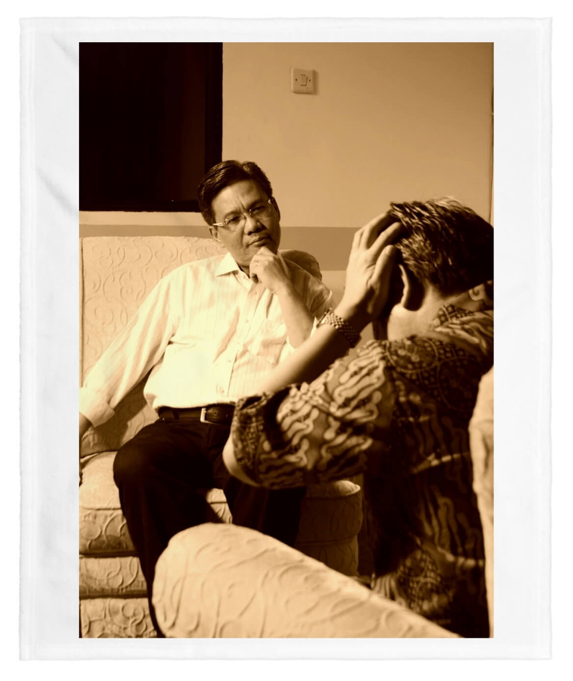 La psicoterapia, unos de los mejores tratamientos para el trastorno de personalidad.